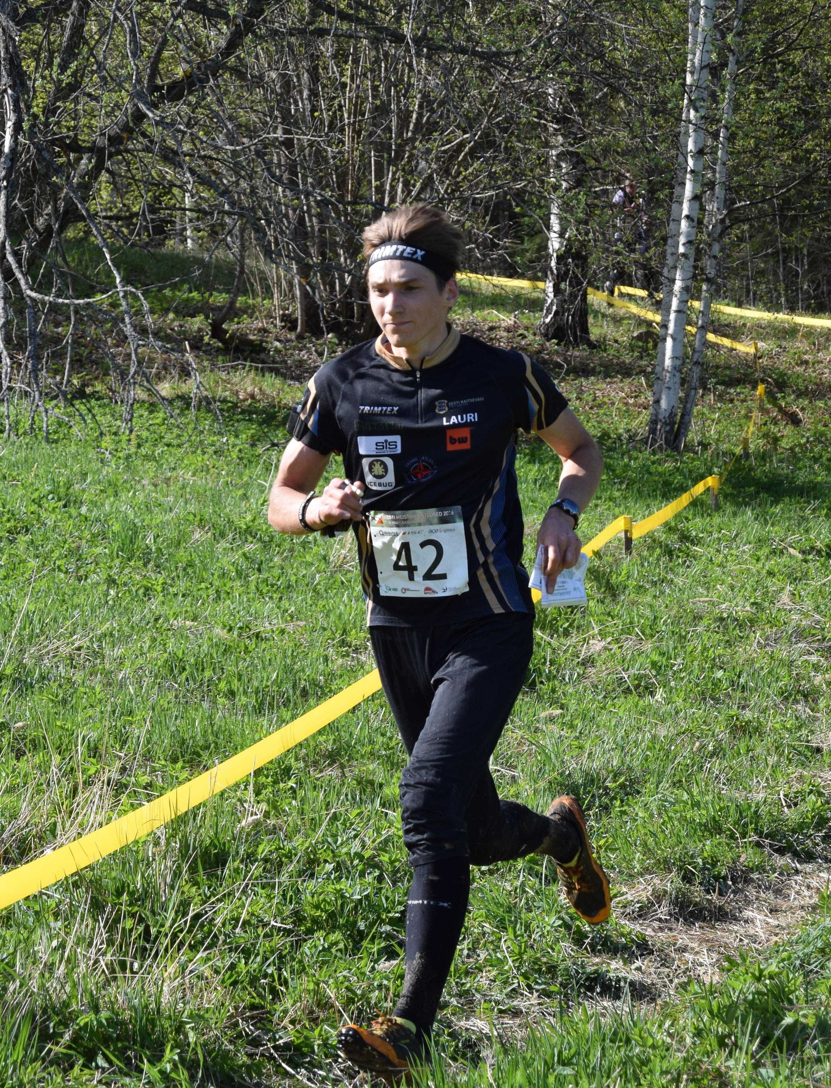 Lauri Sild, 2016